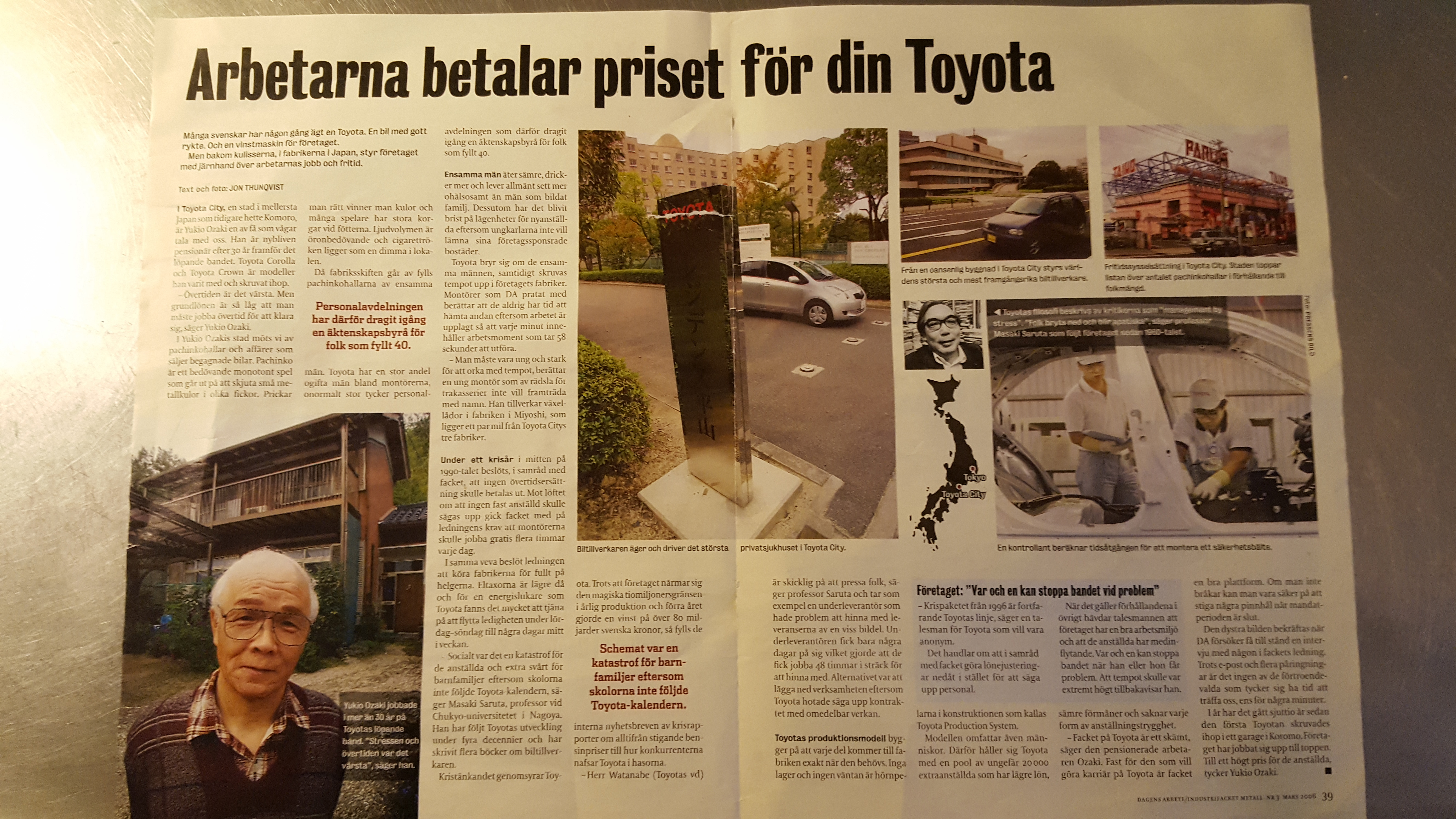 Många Svenskar har någon gång ägt en Toyota. En bil med gott rykte och en vinstmaskin för företaget. Men bakom kulisserna, i fabrikerna i Japan, styr företaget med järnhand över arbetarnas jobb och fritid.